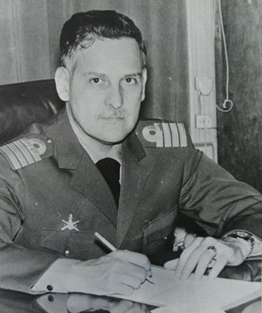 Rodolfo Poletti es un ex militar argentino, perteneciente a la Armada Argentina, que alcanzó la jeraquía de Capitán de Navío. Ocupó el cargo de interventor federal y Gobernador de facto de Misiones, del 17 de marzo de 1977 al 1 de noviembre de 1978, durante la presidencia de facto de Jorge Rafael Videla durante el Proceso de Reorganización Nacional.